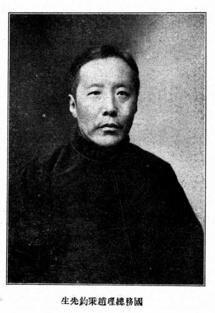 趙秉鈞肖像